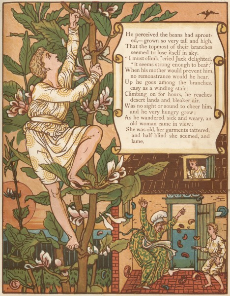 Гравюры по рисункам Крейна к сказкам «Синяя Борода», «Спящая Красавица», «Красная Шапочка», «Джек и бобовый стебель»